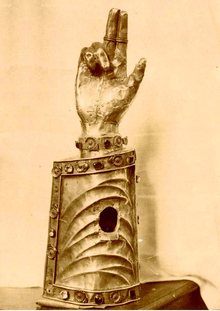 Bras-reliquaire de saint Ouen, XVIe siècle, complété depuis par un médaillon-reliquaire appliqué devant le trou dans le bras.